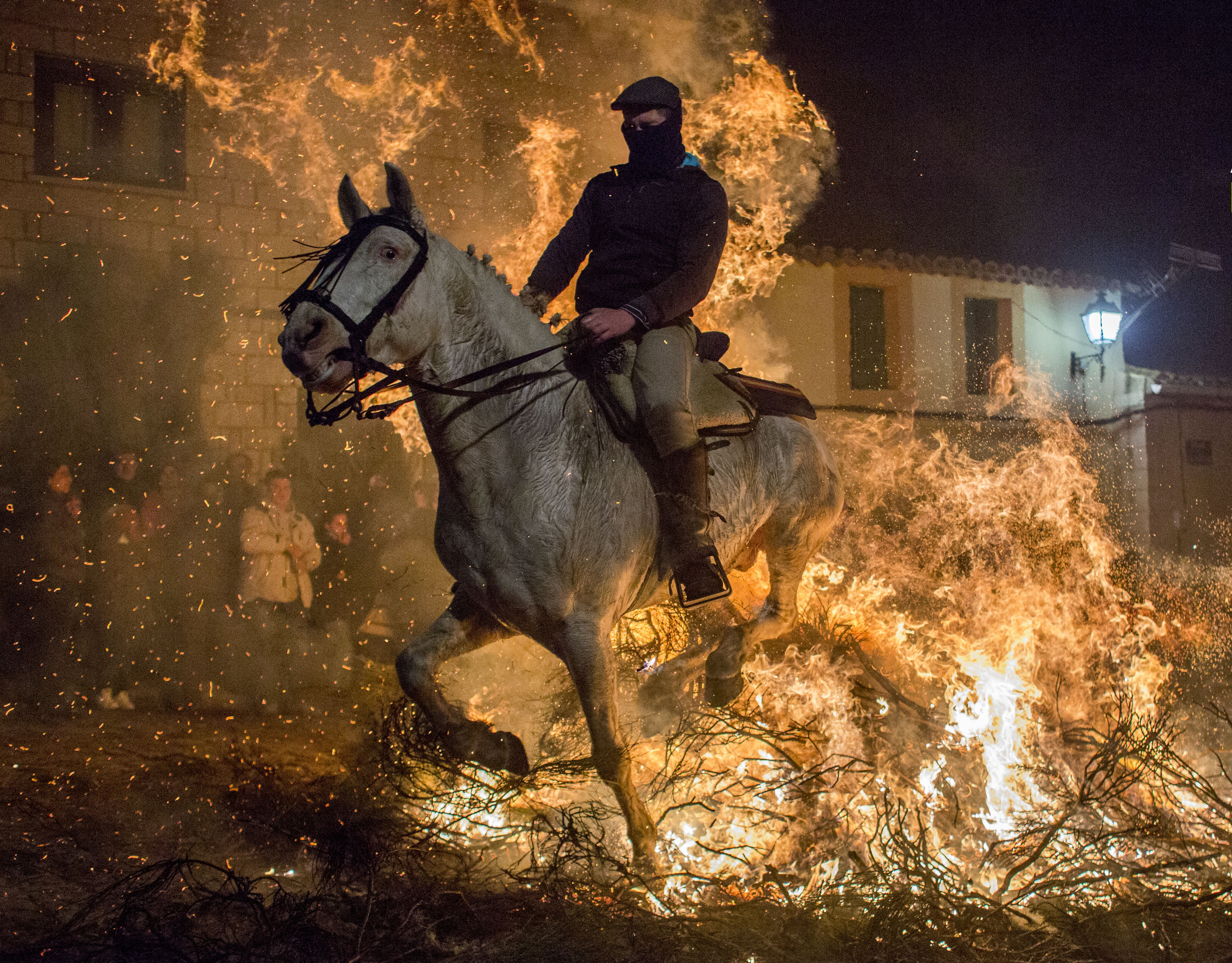 PACMA saca a la luz las “Luminarias”, un festejo desconocido en España, en el que se obliga a los caballos a atravesar grandes hogueras “para su purificación”.